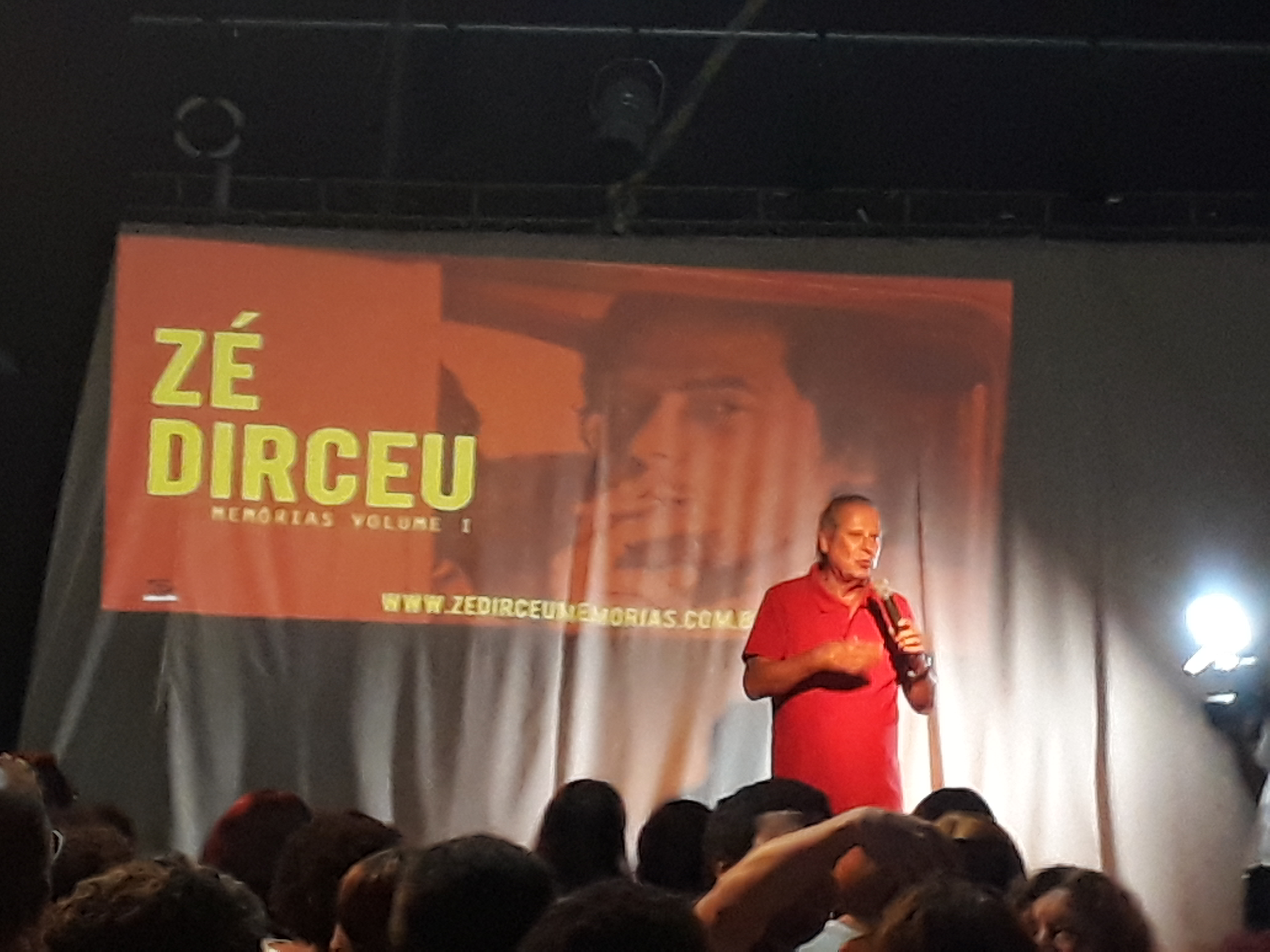 José Dirceu em palestra de lançamento do primeiro volume de sua biografia em evento realizado em Ilhéus, BA, na noite de 18/01/2019.